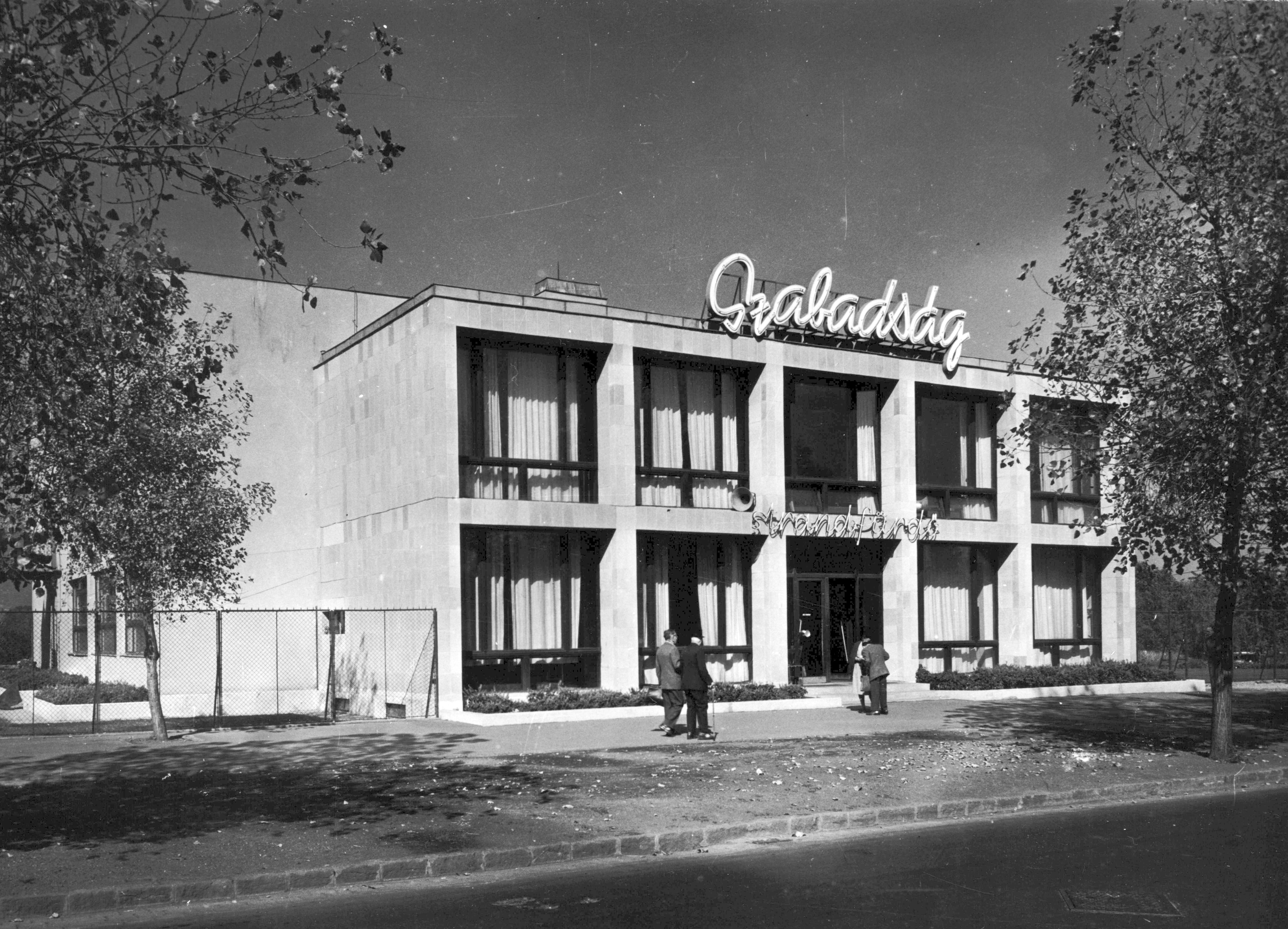 Népfürdő utca, Dagály (Szabadság) Strandfürdő. A kép forrását kérjük így adja meg: Fortepan / Budapest Főváros Levéltára. Levéltári jelzet: HU_BFL_XV_19_c_11 Location: Hungary, Budapest XIII. Tags: Budapest Title: Népfürdő utca, Dagály (Szabadság) Strandfürdő. A kép forrását kérjük így adja meg: Fortepan / Budapest Főváros Levéltára. Levéltári jelzet: HU_BFL_XV_19_c_11